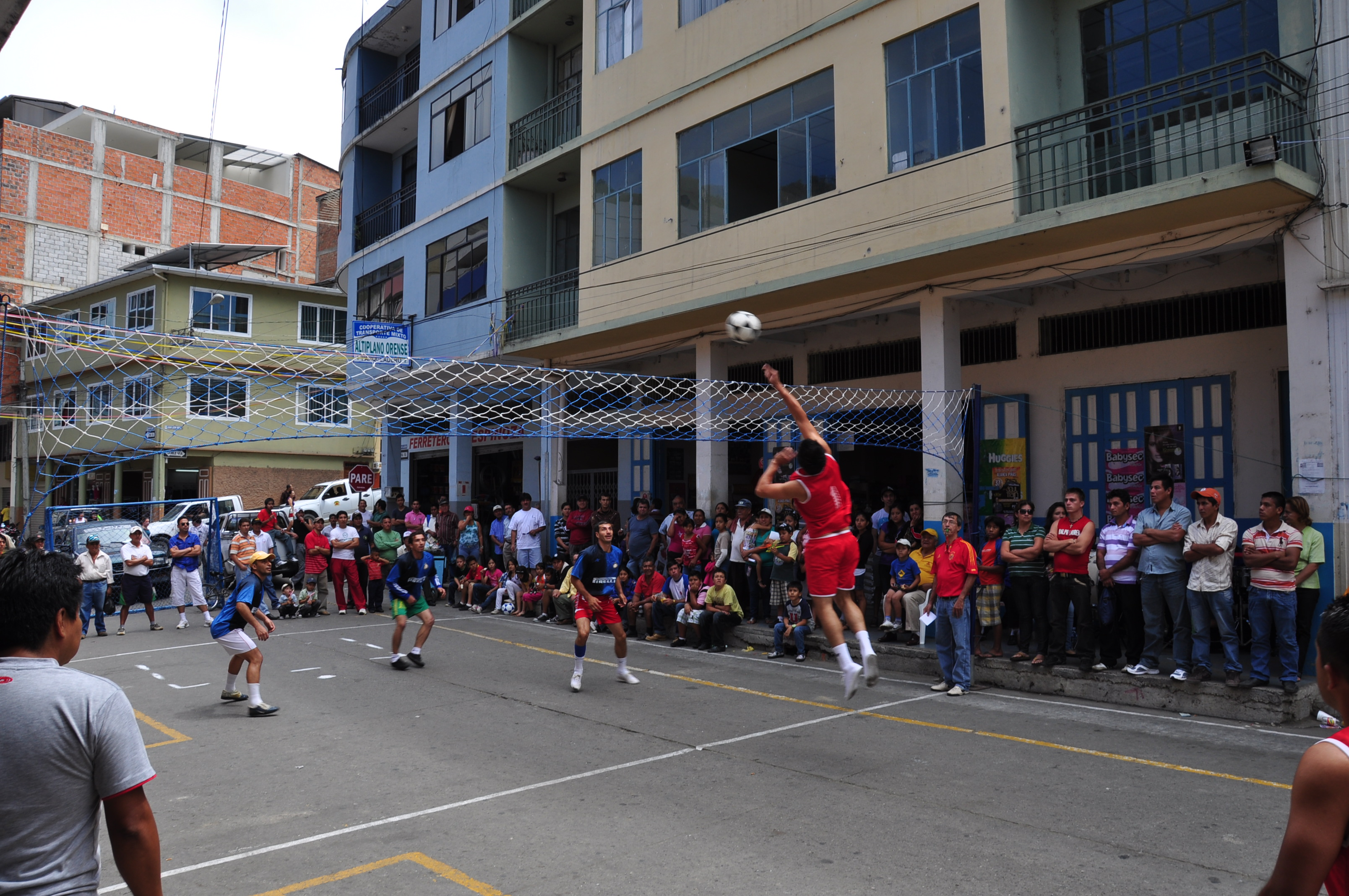 Fiestas patronales del Mercado Central de Piñas, encuentro de ecuavóley entre el Gobierno Municipal y el Sindicato de Choferes.